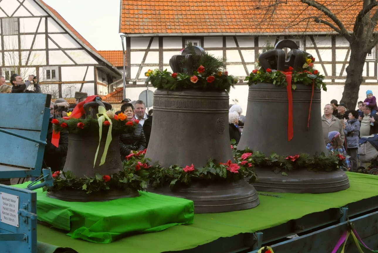 Kirchturmglocken der St. Lukas-Kirche in Mühlberg (Thüringen)